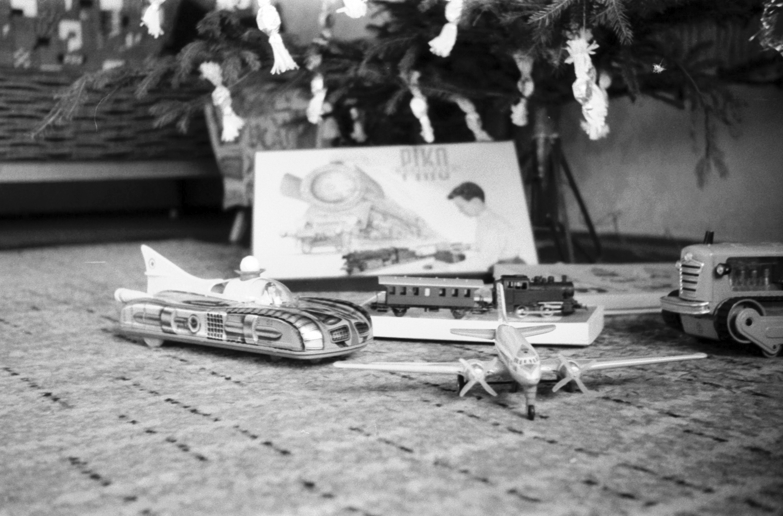 A Budapesti Lemezárugyár játékai a Holdautó, repülőgép és egy PIKO villanyvasút